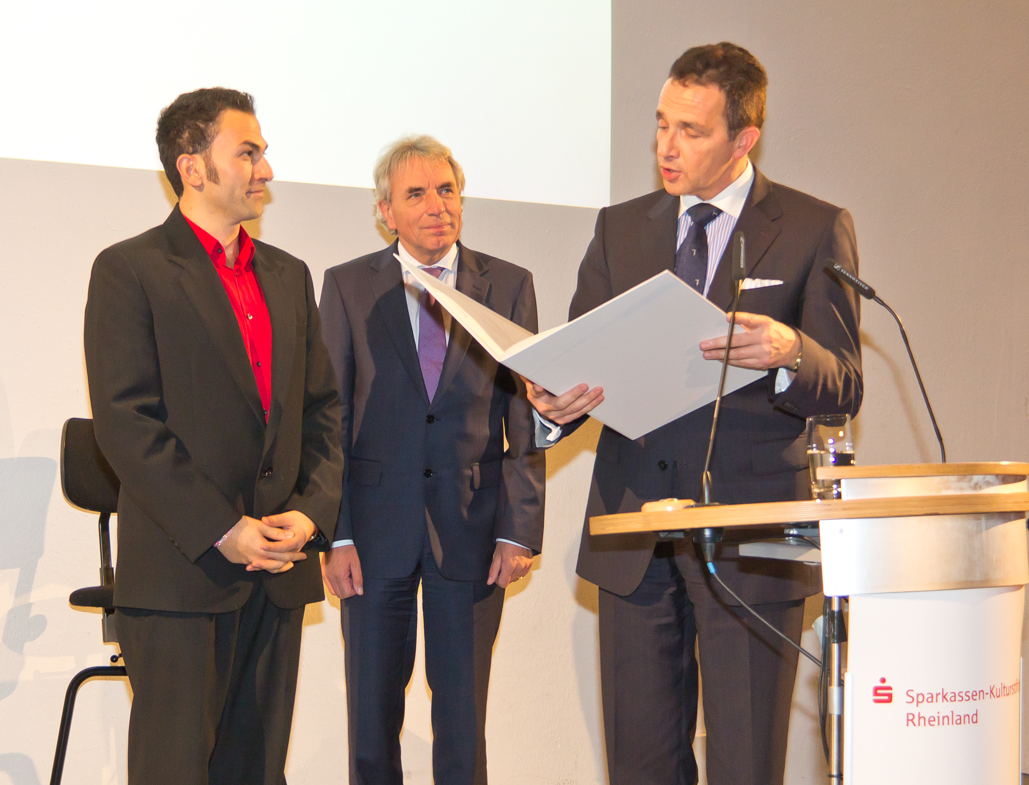 Verleihung des Rheinischen Kulturpreises der Sparkassen-Kulturstiftung Rheinland in der Piazetta des historischen Rathauses von Köln an Alexandra Kassen. Übergabe des Förderpreises an den Kabarettisten Fatih Çevikkollu. Depicted people: Fatih Çevikkollu (Förderpreisträger, Kabarettist), Jürgen Roters (Oberbürgermeister von Köln) and Dr. Christoph Landscheidt (Bürgermeister der Stadt Kamp-Lintfort und Vorsitzender des Vorstandes der Sparkassen-Kulturstiftung Rheinland)